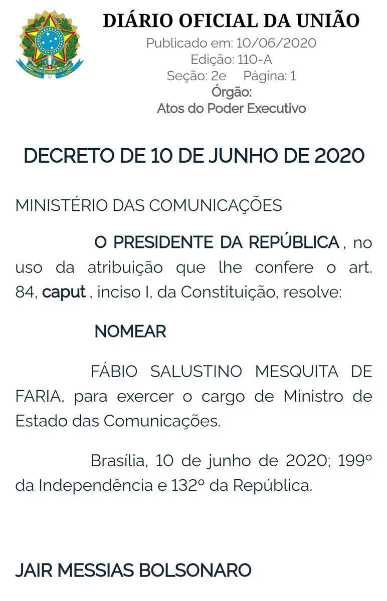 Decreto de nomeação do Ministério das Comunicações do Brasil em junho de 2020.